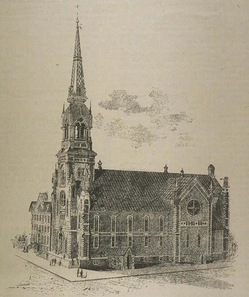 Reportage du Monde Illustré sur le feu de Hull en 1900.